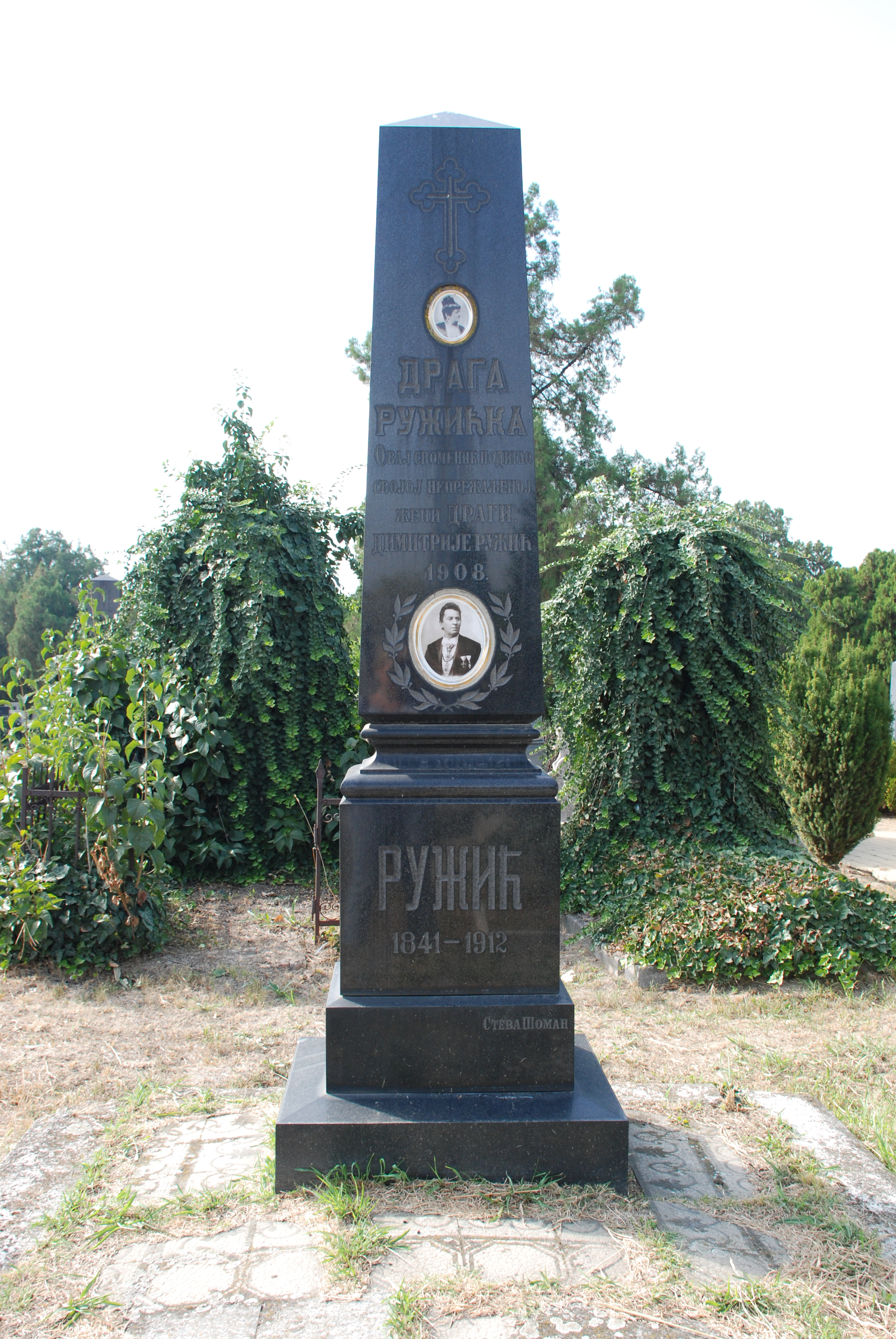 Димитрије 1841-1912, глумац и редитељ, управник СНПа у Новом Саду, најпопуларнији и најзначајнији глумац наше романтичарске епохе. Драгиња 1834-1905, глумица у СНПу у Новом Саду, највећа српска глумица свог доба